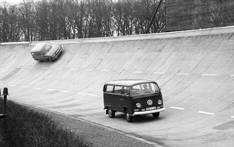 VW-Werk, Wolfsburg Forschung und Entwicklungsabteilung